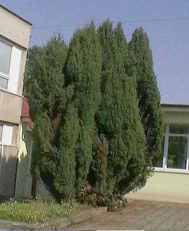 Česky: Brno-Žabovřesky, ČR, Juniperus communis